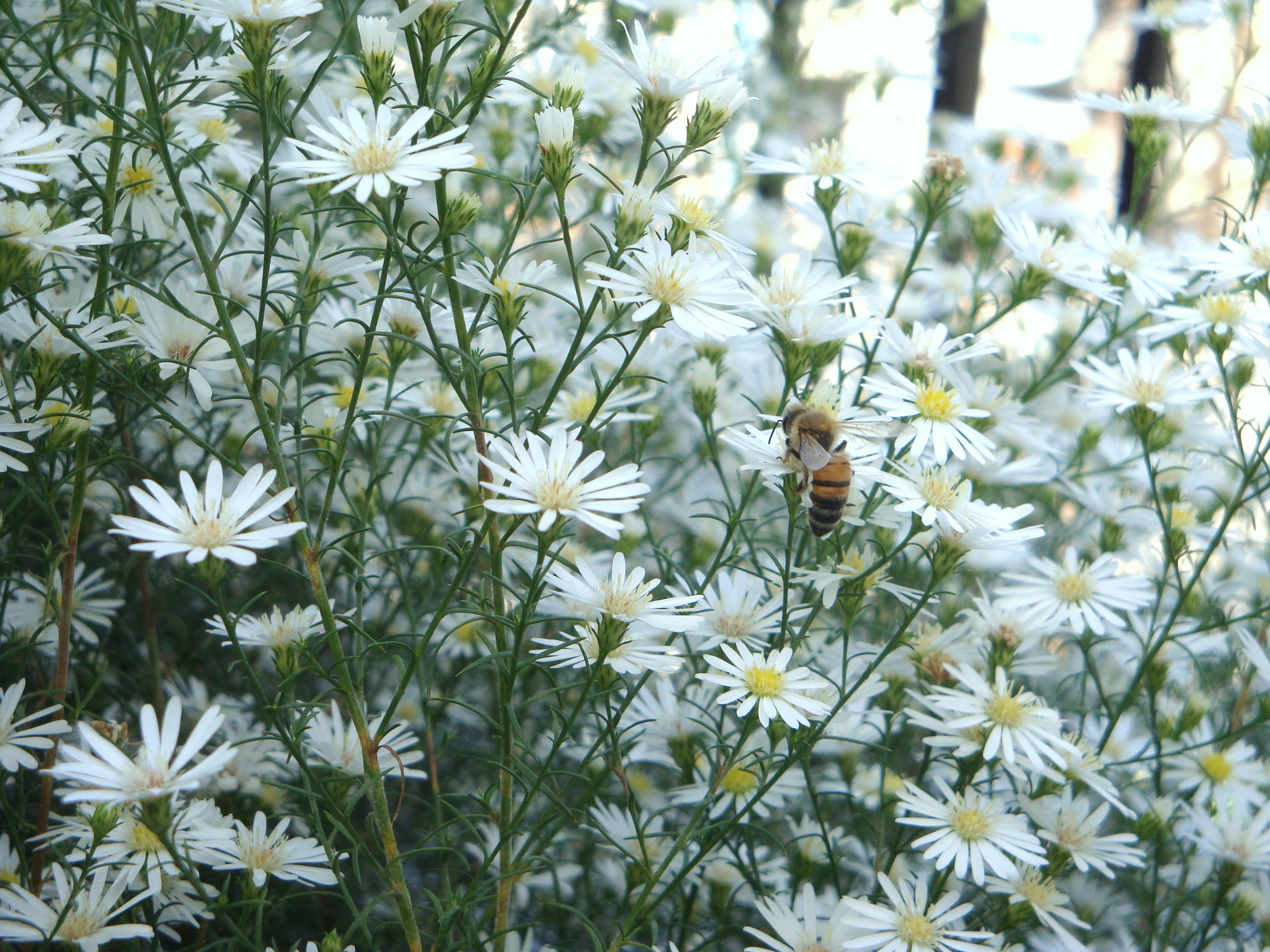 Plantación de Anthemis cotula